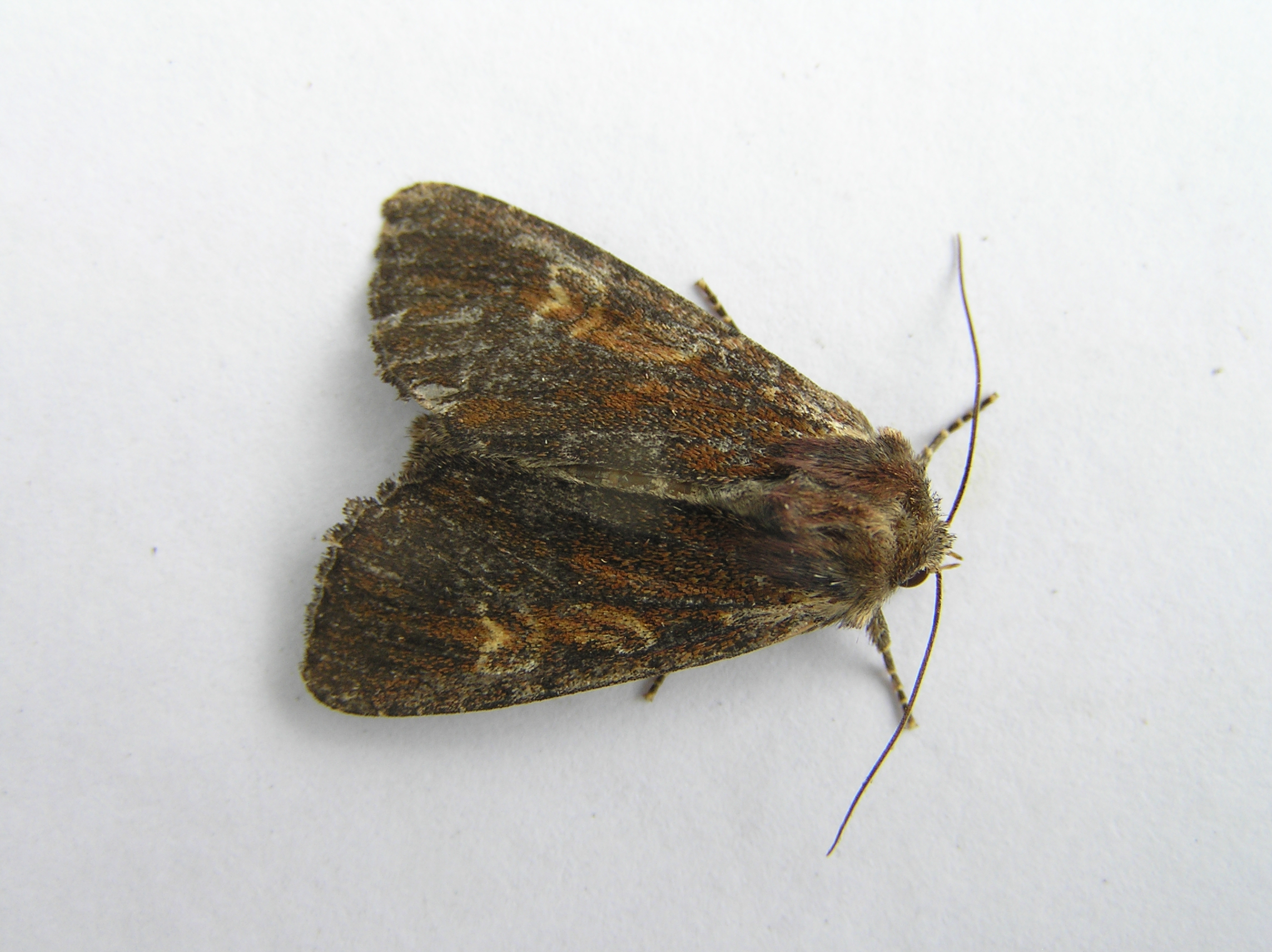 Apamea crenata (Zwaakse Weel, the Netherlands)